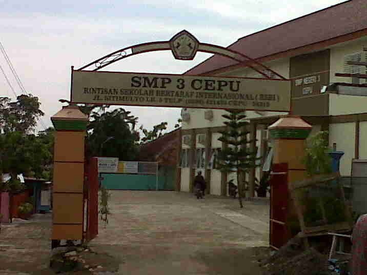 SMP N 3 Cepu Blora Jawa Tengah Indonesia